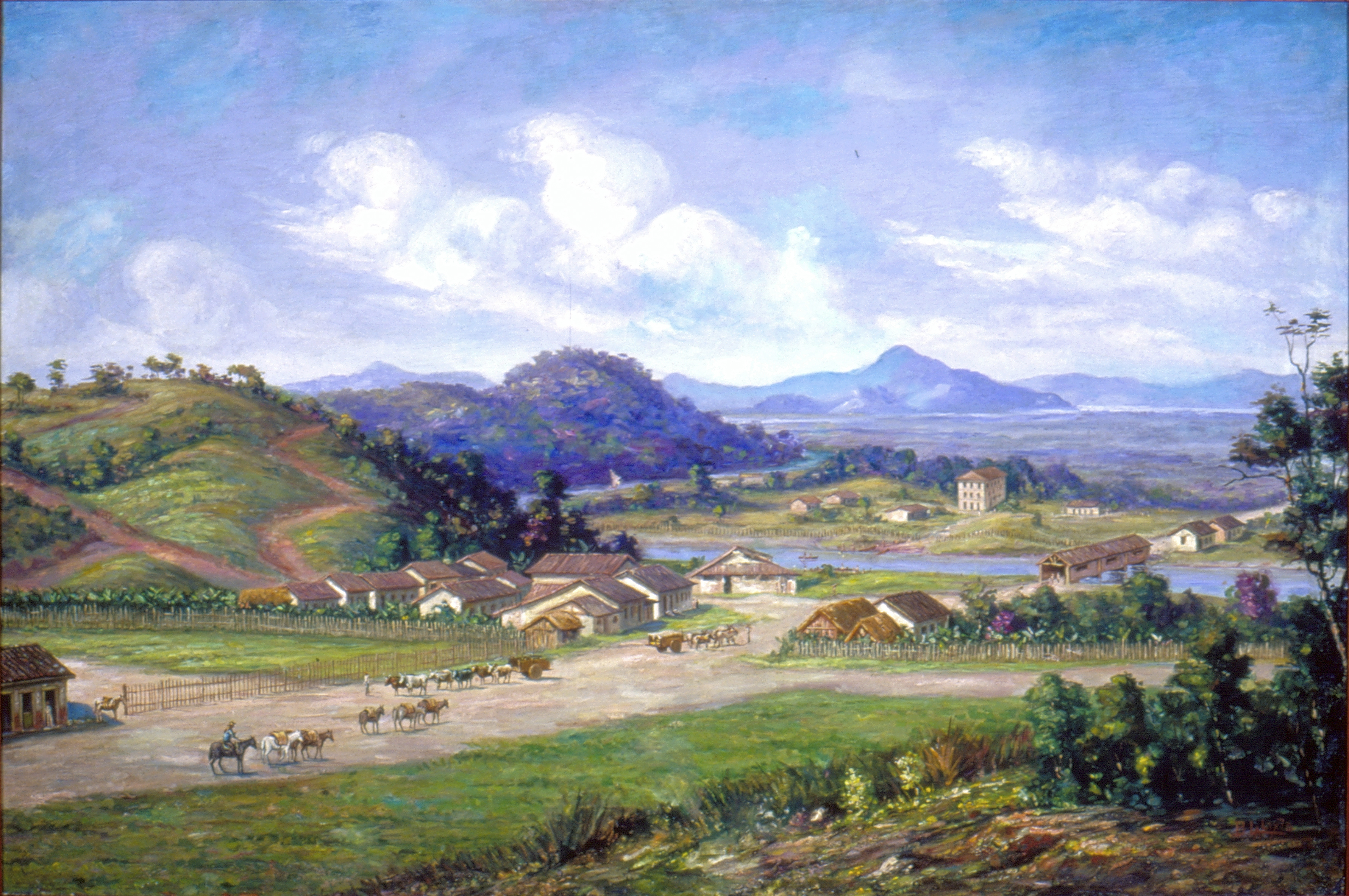 Obra que integra o acervo do Museu Paulista da USP. Coleção Benedito Calixto de Jesus - CBCJ